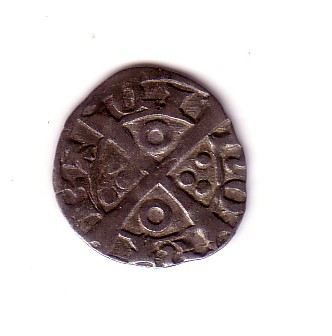 Diner, de Barcelona, de Pere III (revers)